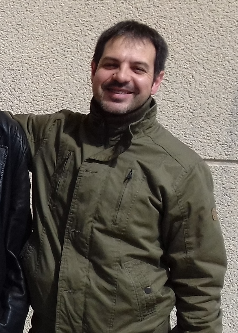 Manel Pardo, Raquel Ejerique, Aníbal Malvar e Xurxo Salgado en Teo